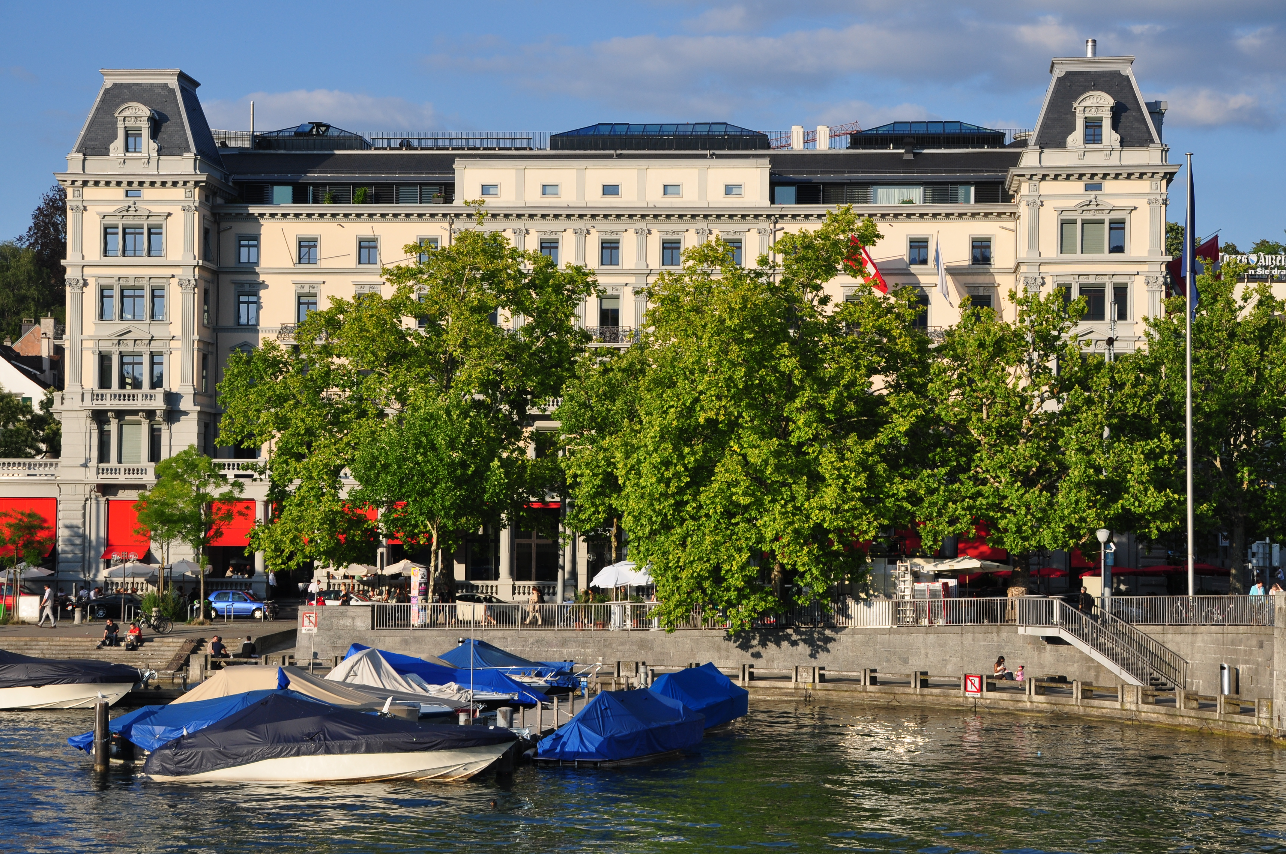 Haus Bellevue in Zürich (Switzerland) as seen from Münsterbrücke, Limmatquai to the left.